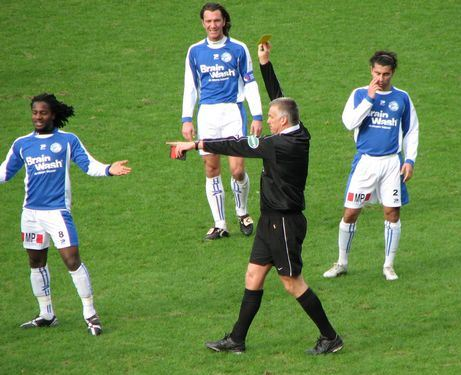 Stanley Aborah